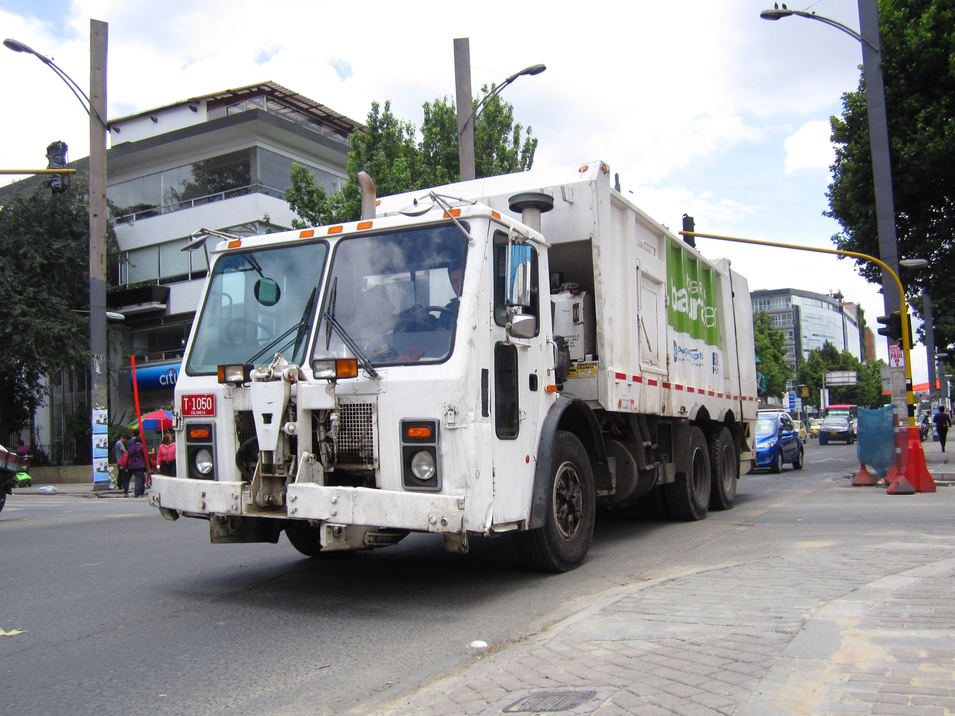 Camión de basuras alquilado durante la administración del alcalde Gustavo Petro en la carrera 15 con calle 92.